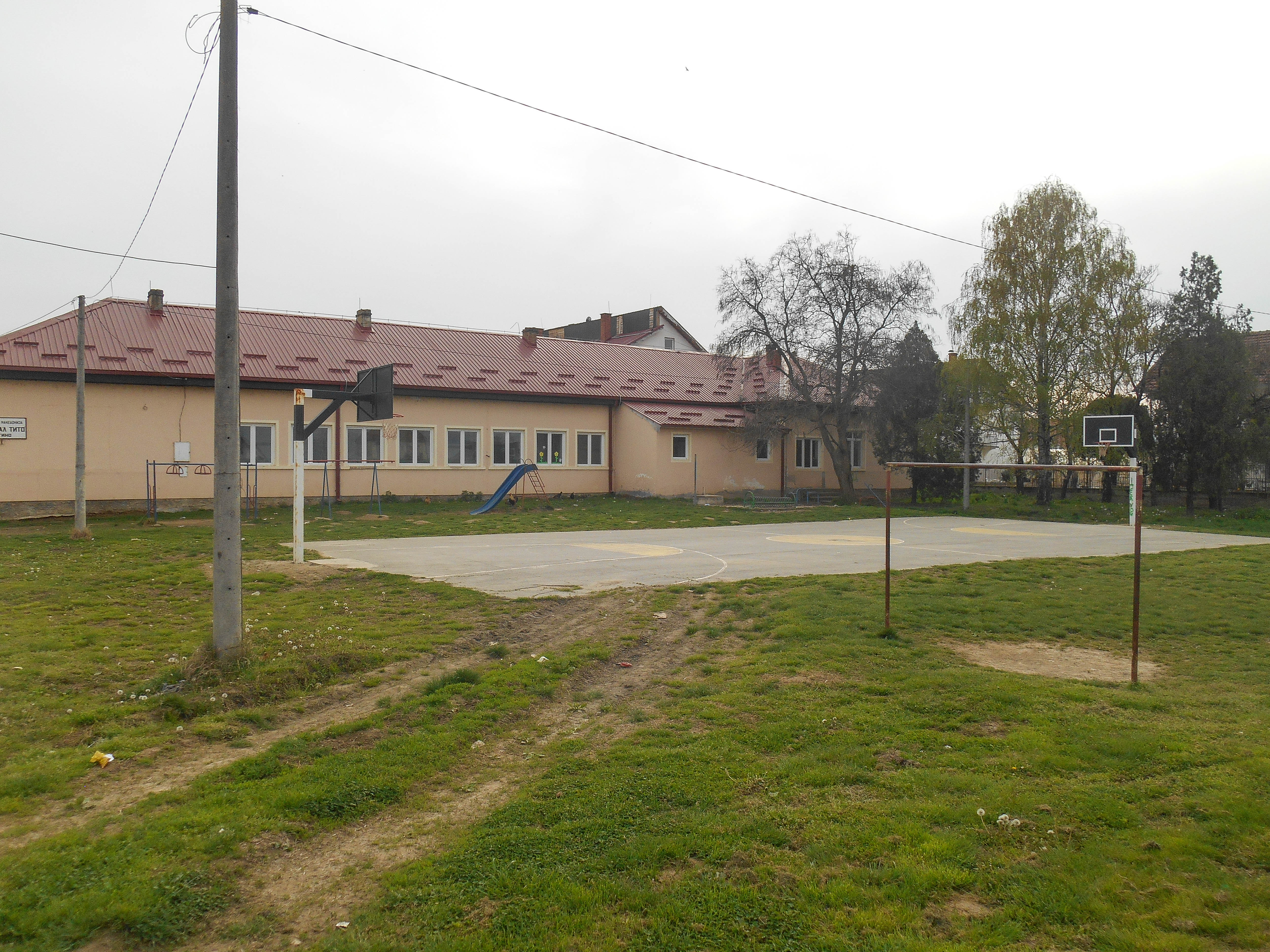 Училиште Маршал Тито - Муртино